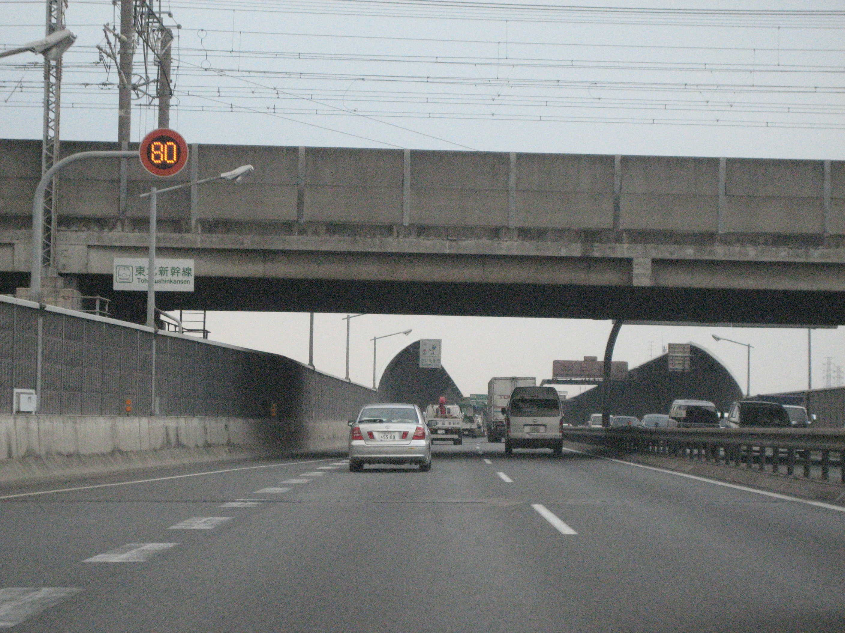 外環道の上を交差する東北新幹線